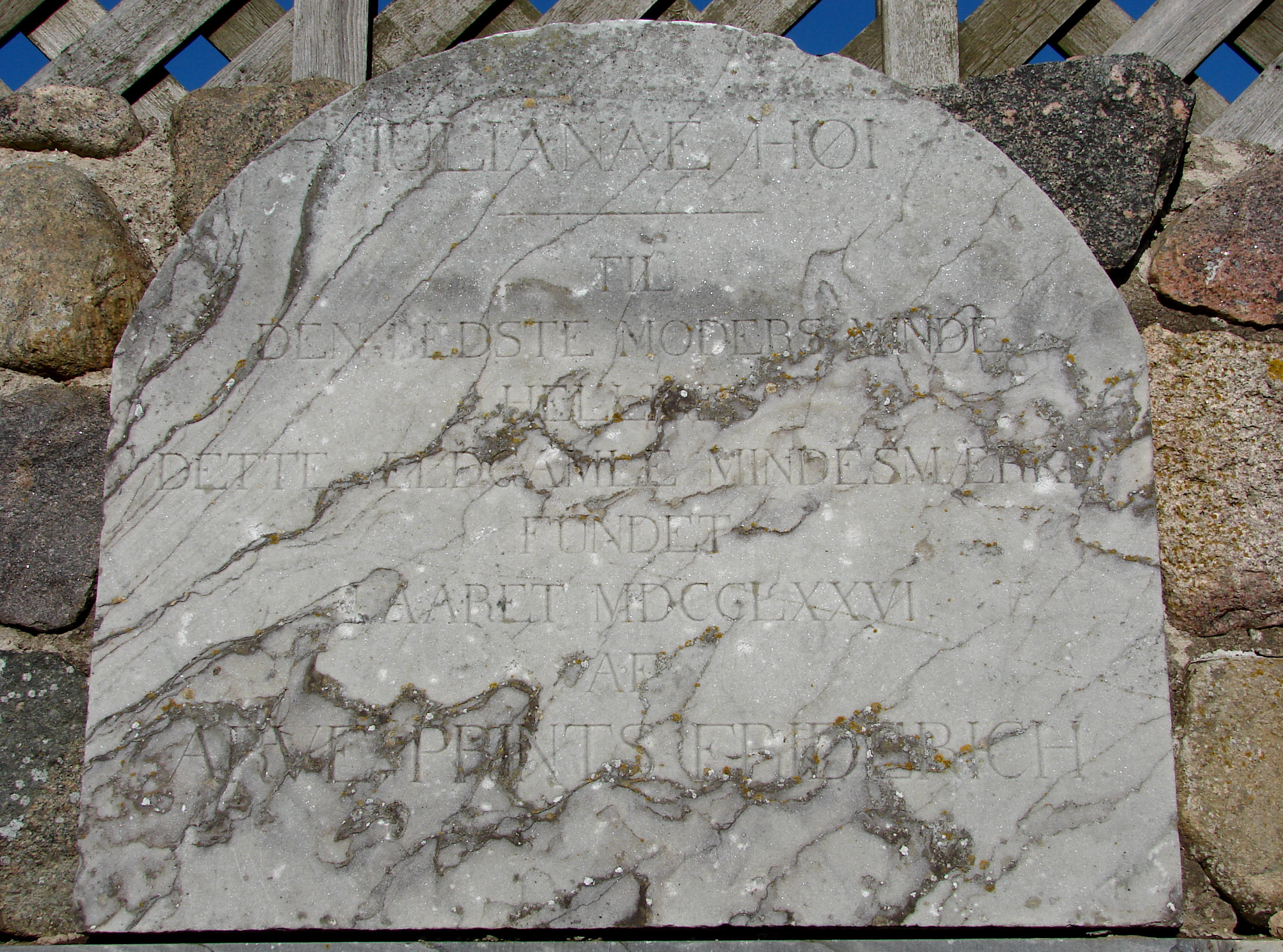 Mindeplade over indgangen til Julianehøj (Julianae høi), stenaldergrav hvor det ydre er moderniseret i 1776 af Arveprins Frederik, pladen er til minde om hans mor enkedronning Juliane Marie af Danmark og Norge, Jægerspris, Sjælland